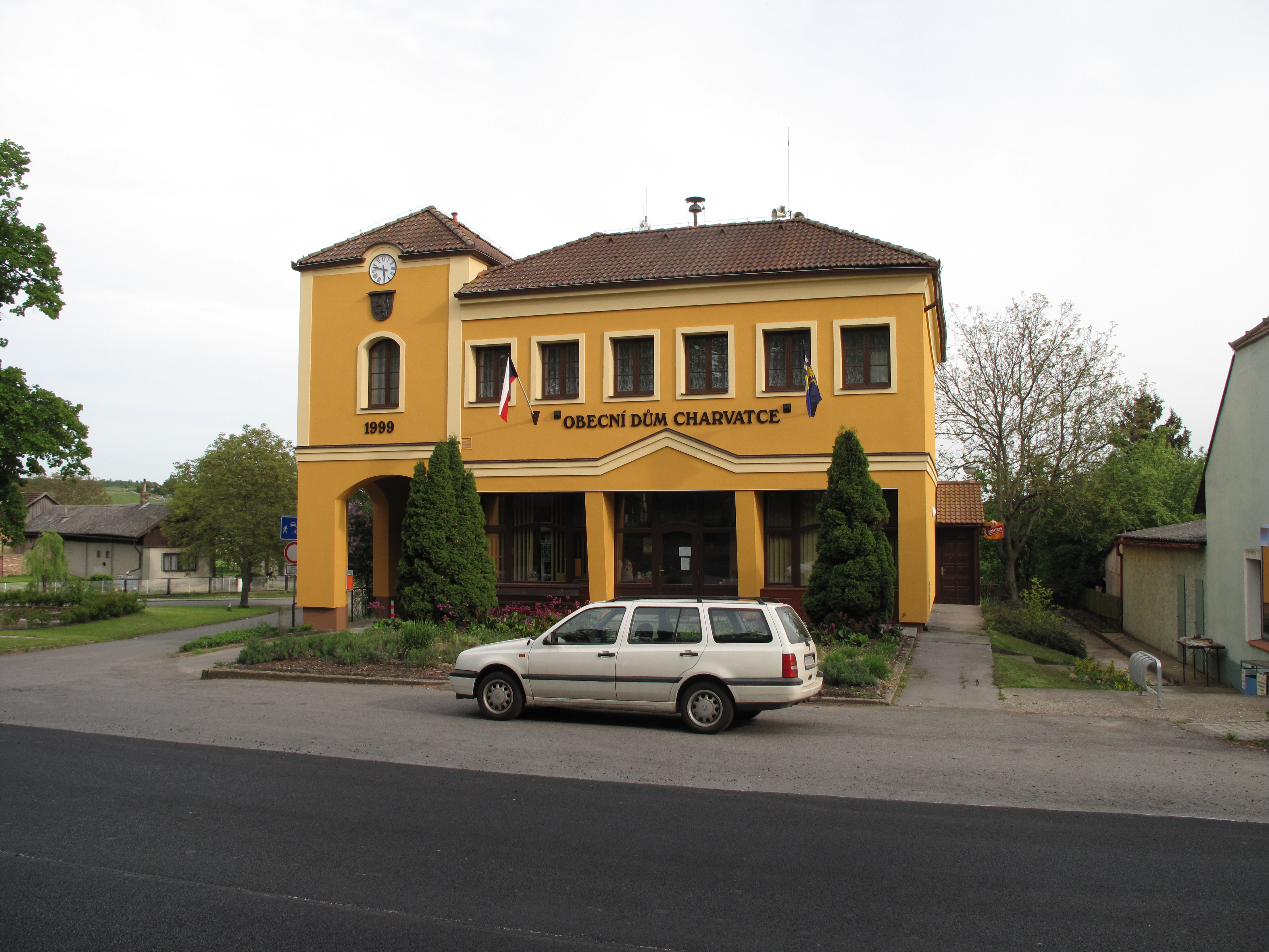 Obecní úřad v Charvatcích. Okres Mladá Boleslav, Česká republika.